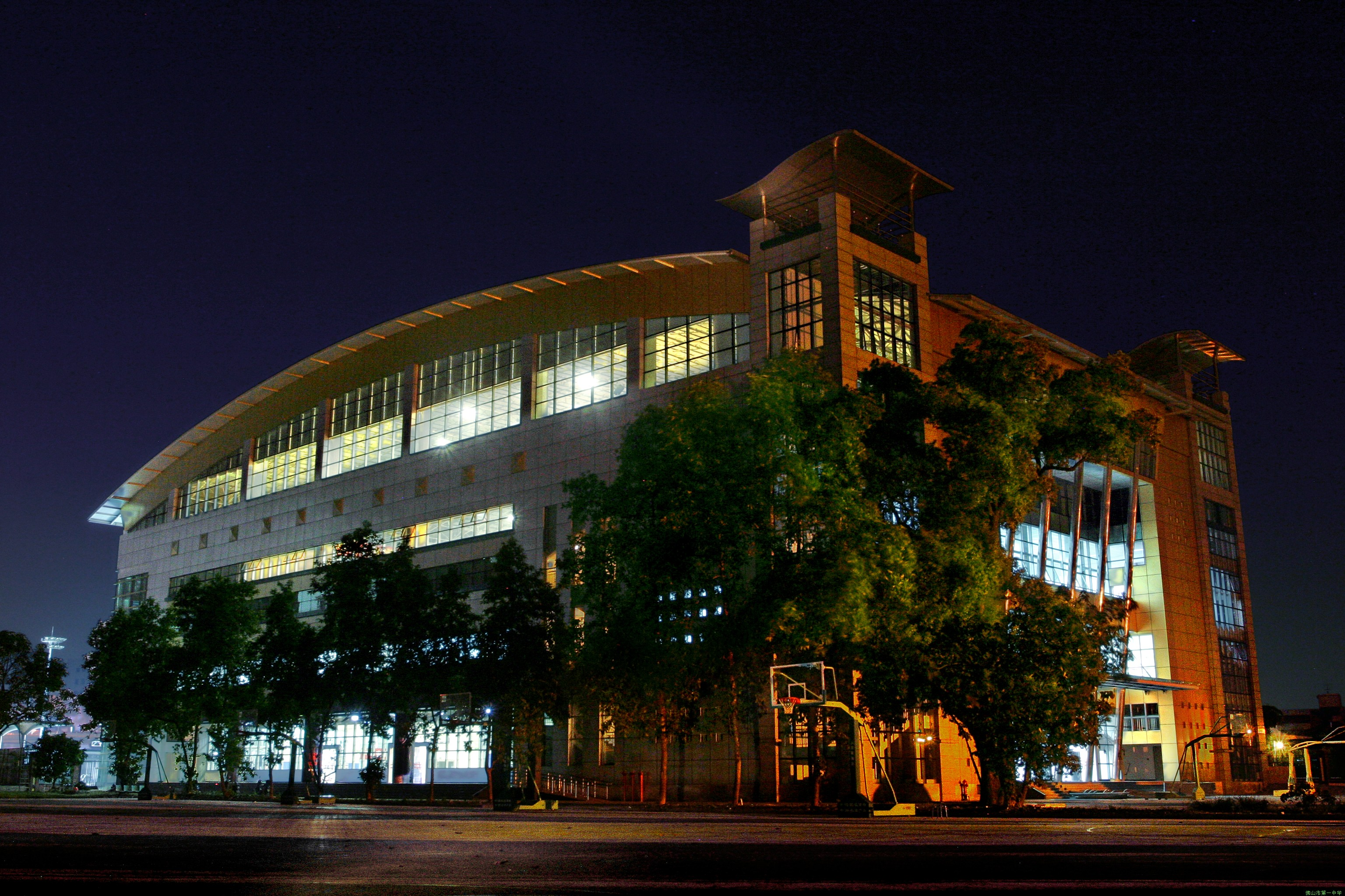 佛山一中新体育馆